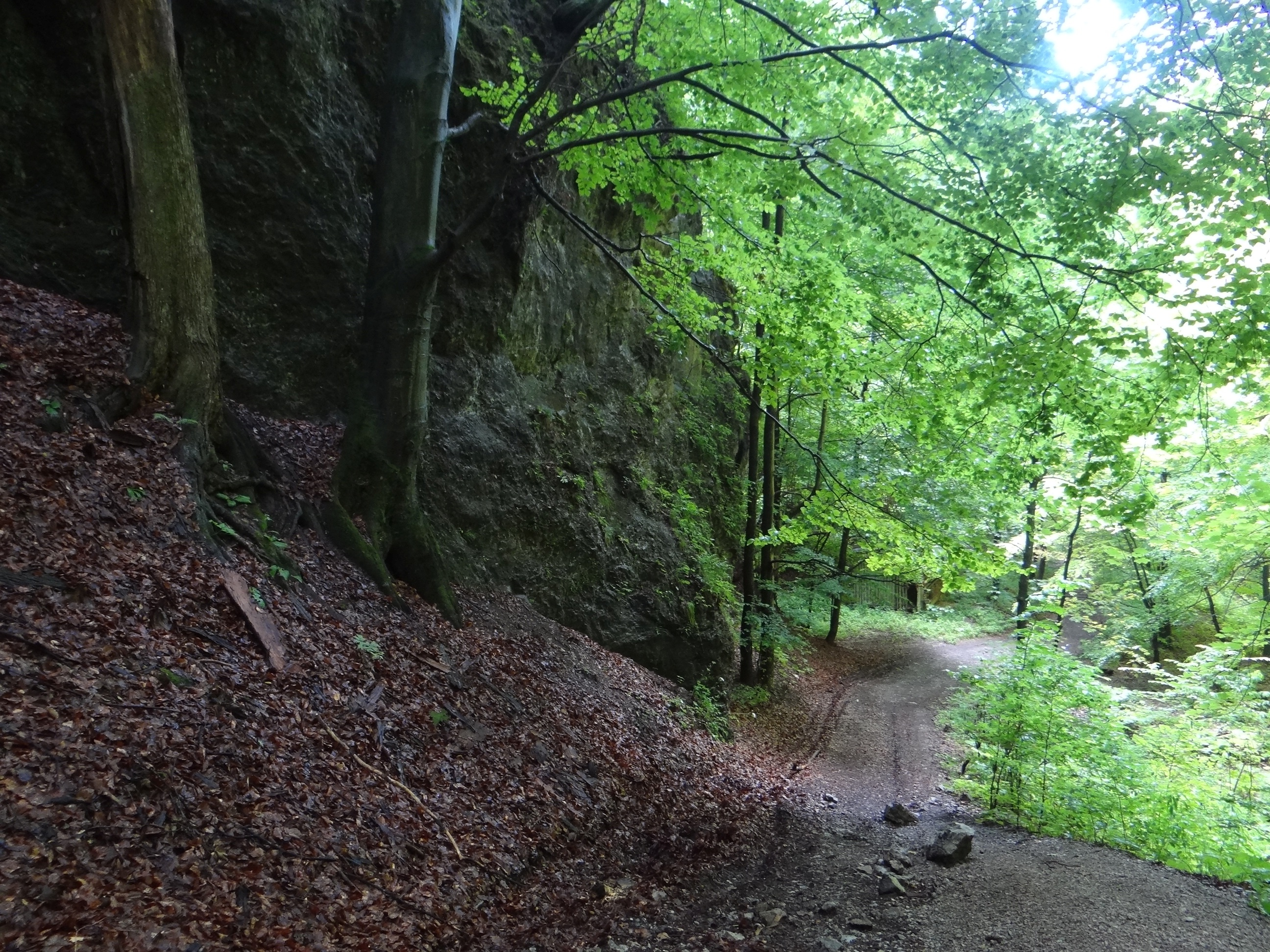 Dolina Rakytov (odgałęzienie Doliny Harmaneckiej)